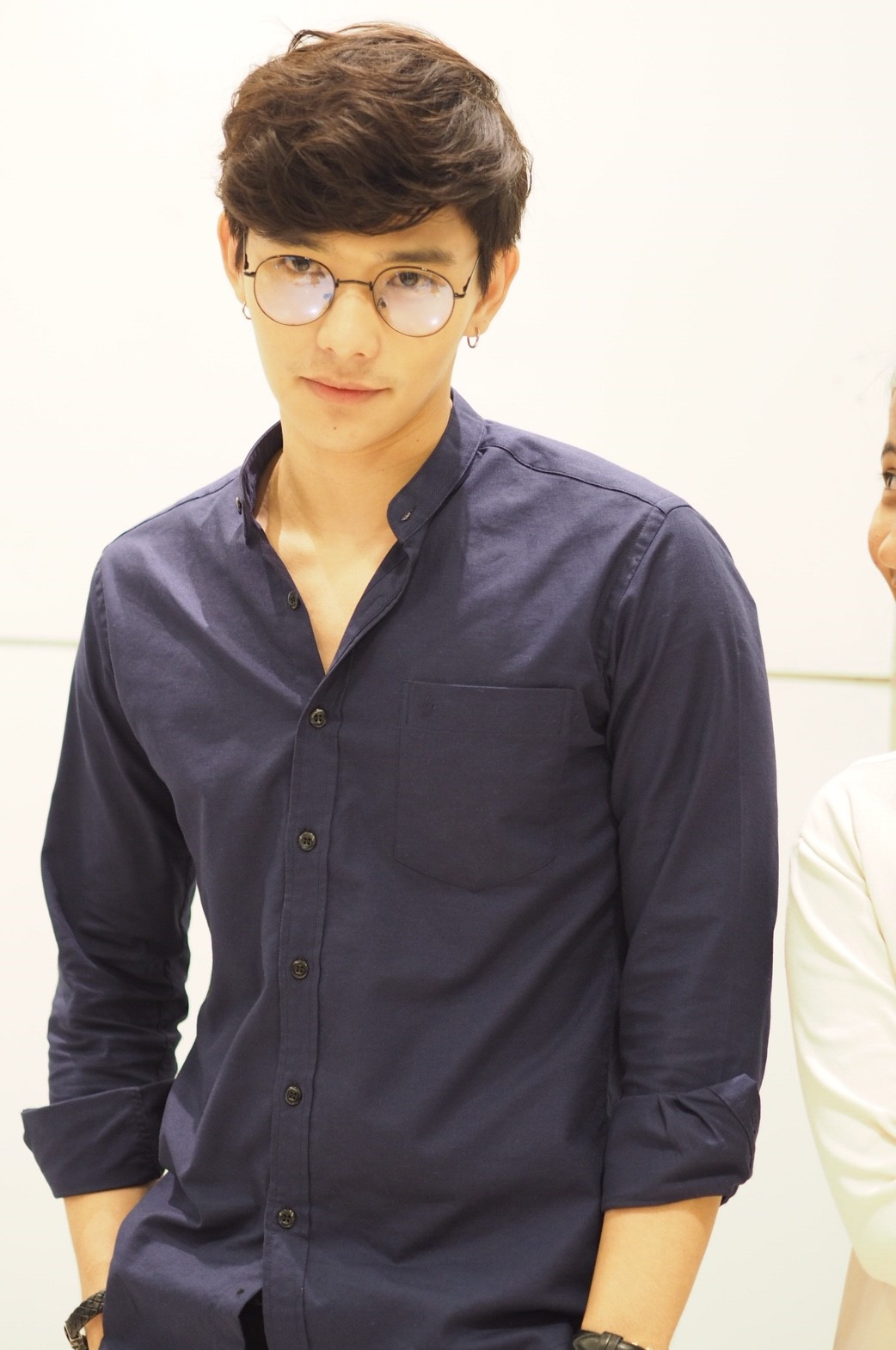 ลีพบแฟนคลับที่ตึกแกรมมี่